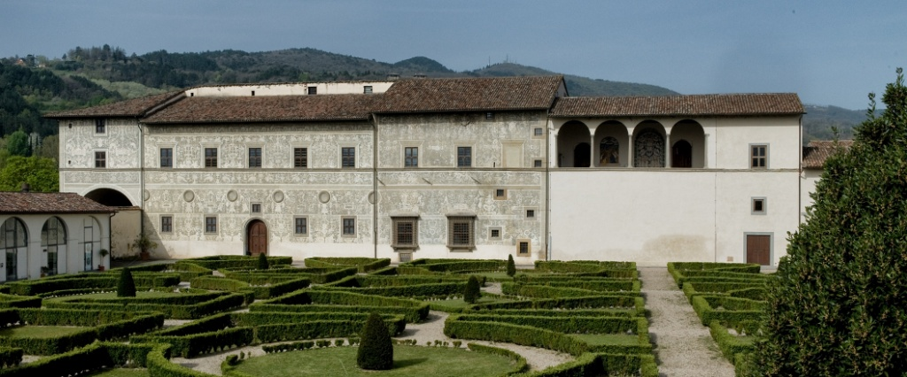 Veduta esterna Palazzo Vitelli alla Cannoniera